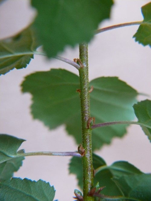 Particolare ghiandole su rametto giovane di Betula aetnensis